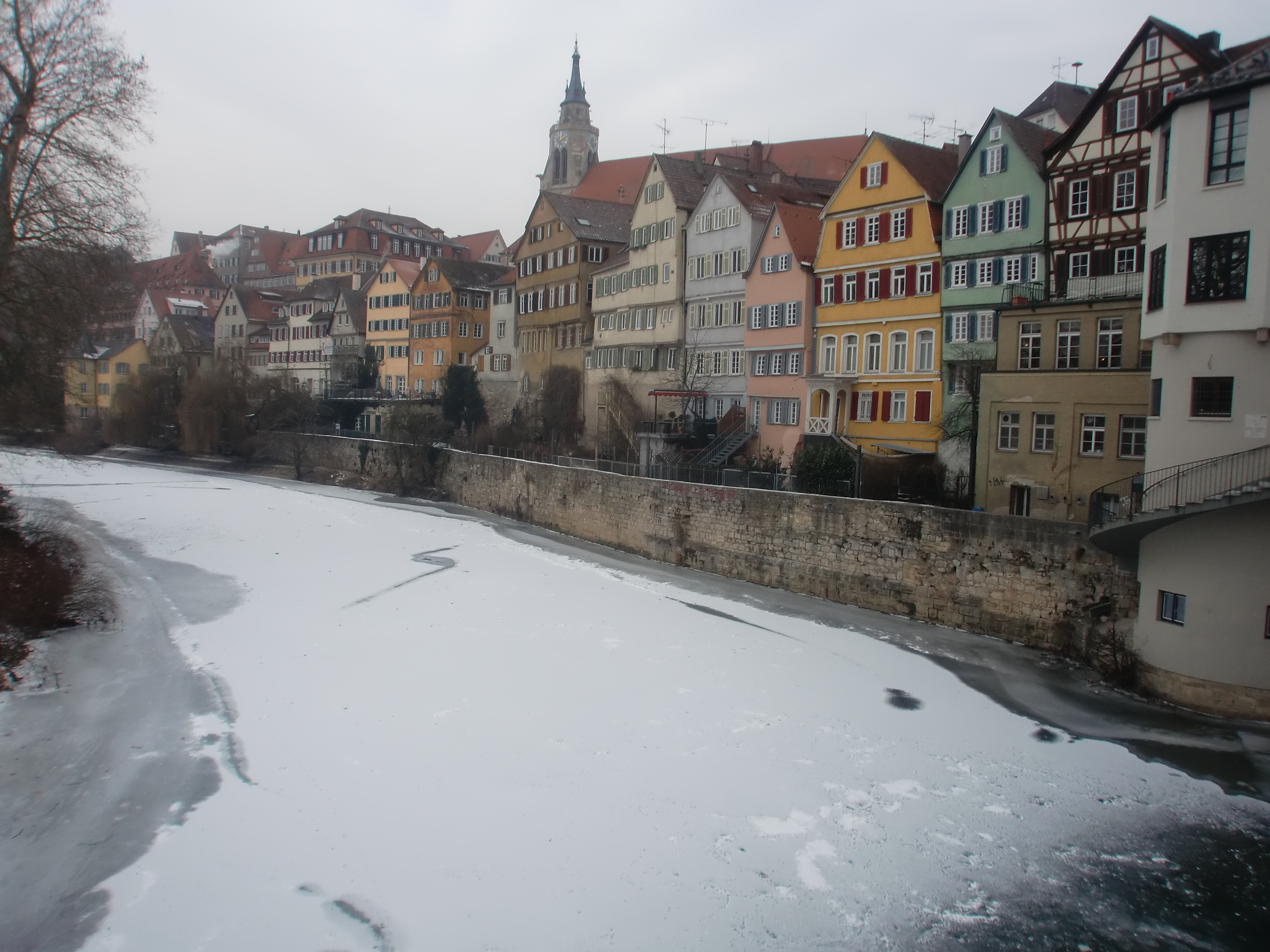 Gefrorener Neckar vor Neckarfront